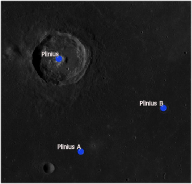 Cráter lunar Plinius. Cráteres satélite. (Imagen LRO)